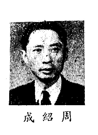 中文（中国大陆）: 制憲國民大會代表